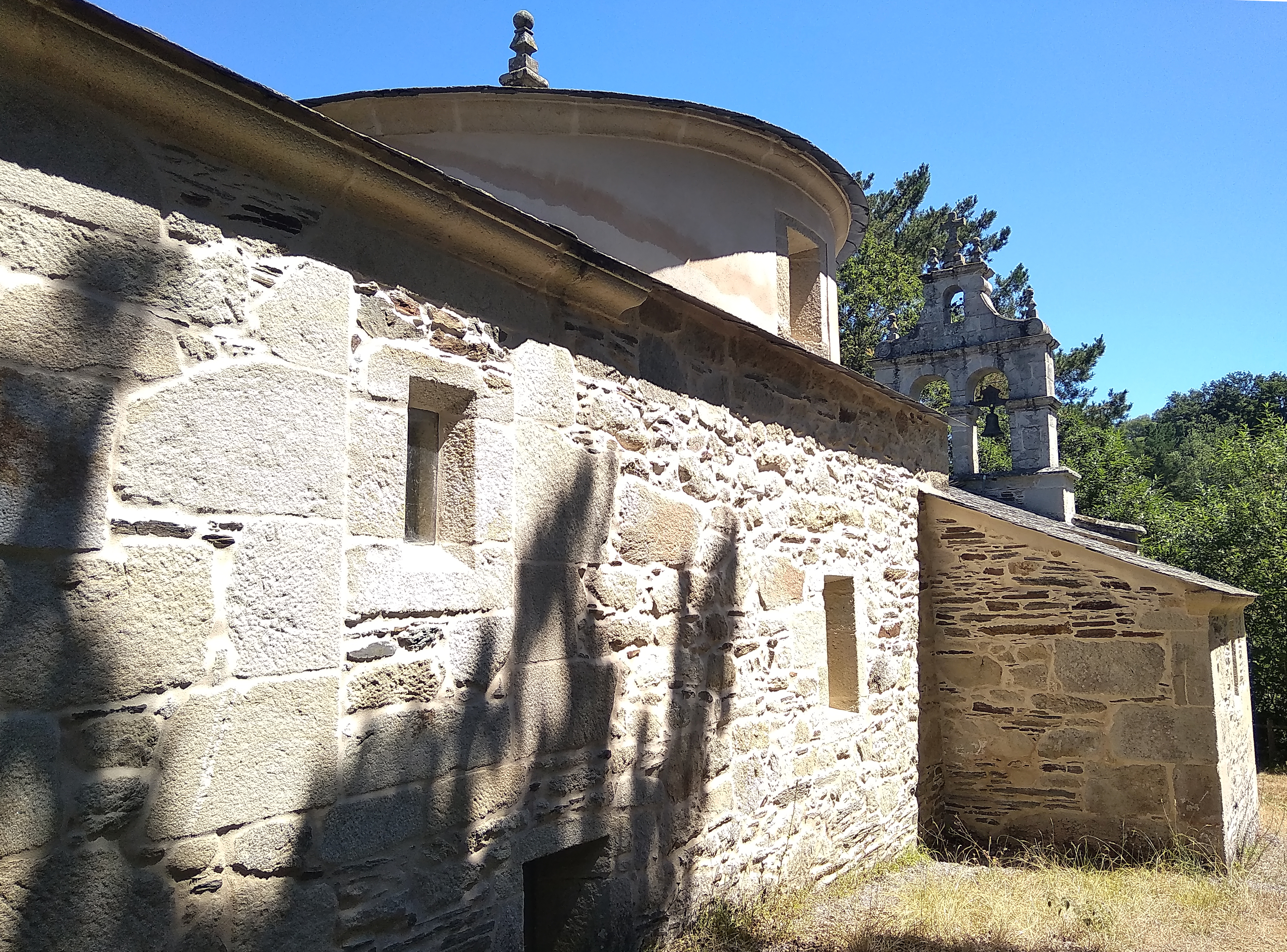 Capela da Virxe do Rosario no lugar de Grandín, no concello de Láncara.